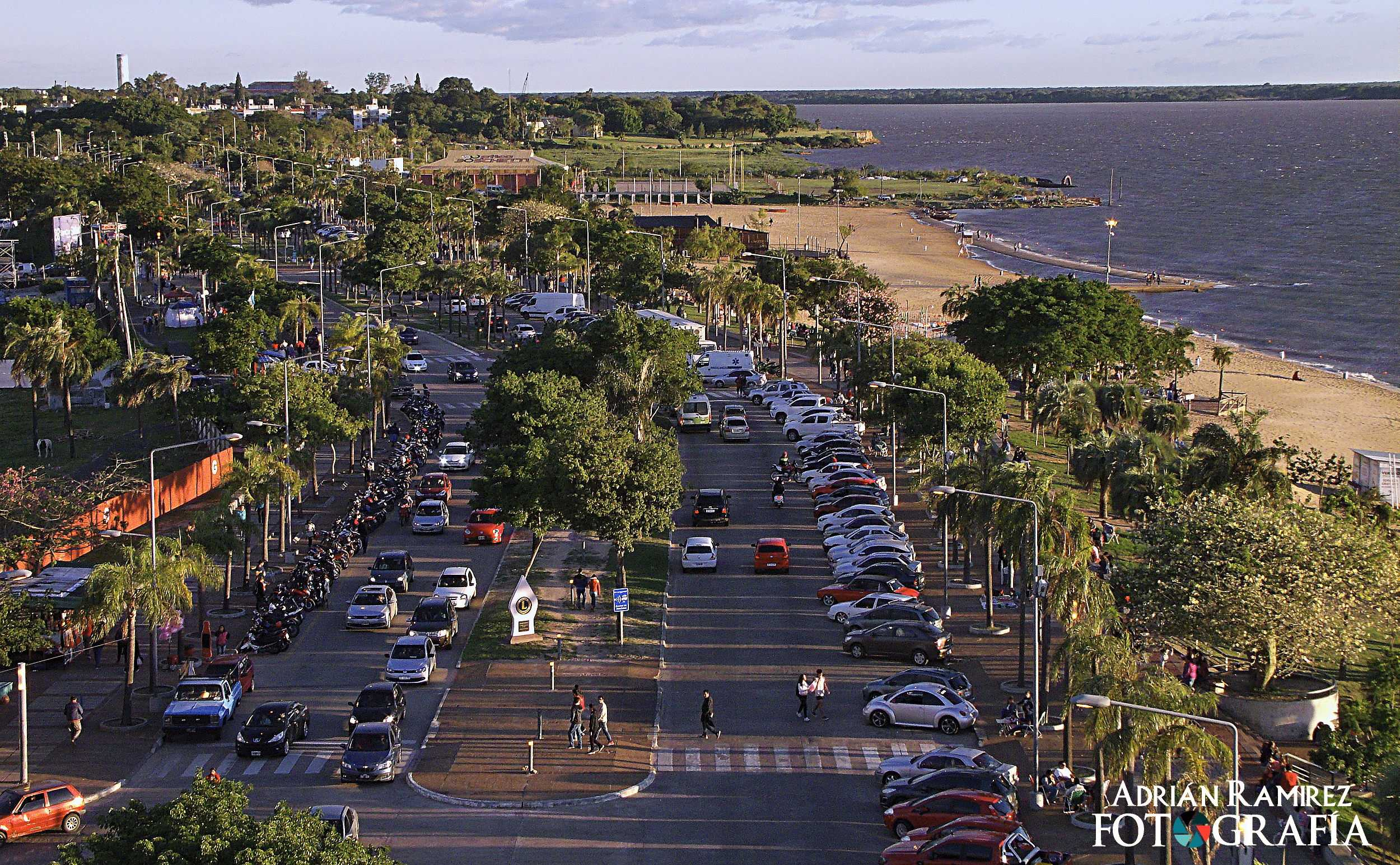 Vista aérea hacia la Av. Costanera Juan Pablo II y Playa Arazaty, desde el Puente General Belgrano. Corrientes, Argentina.